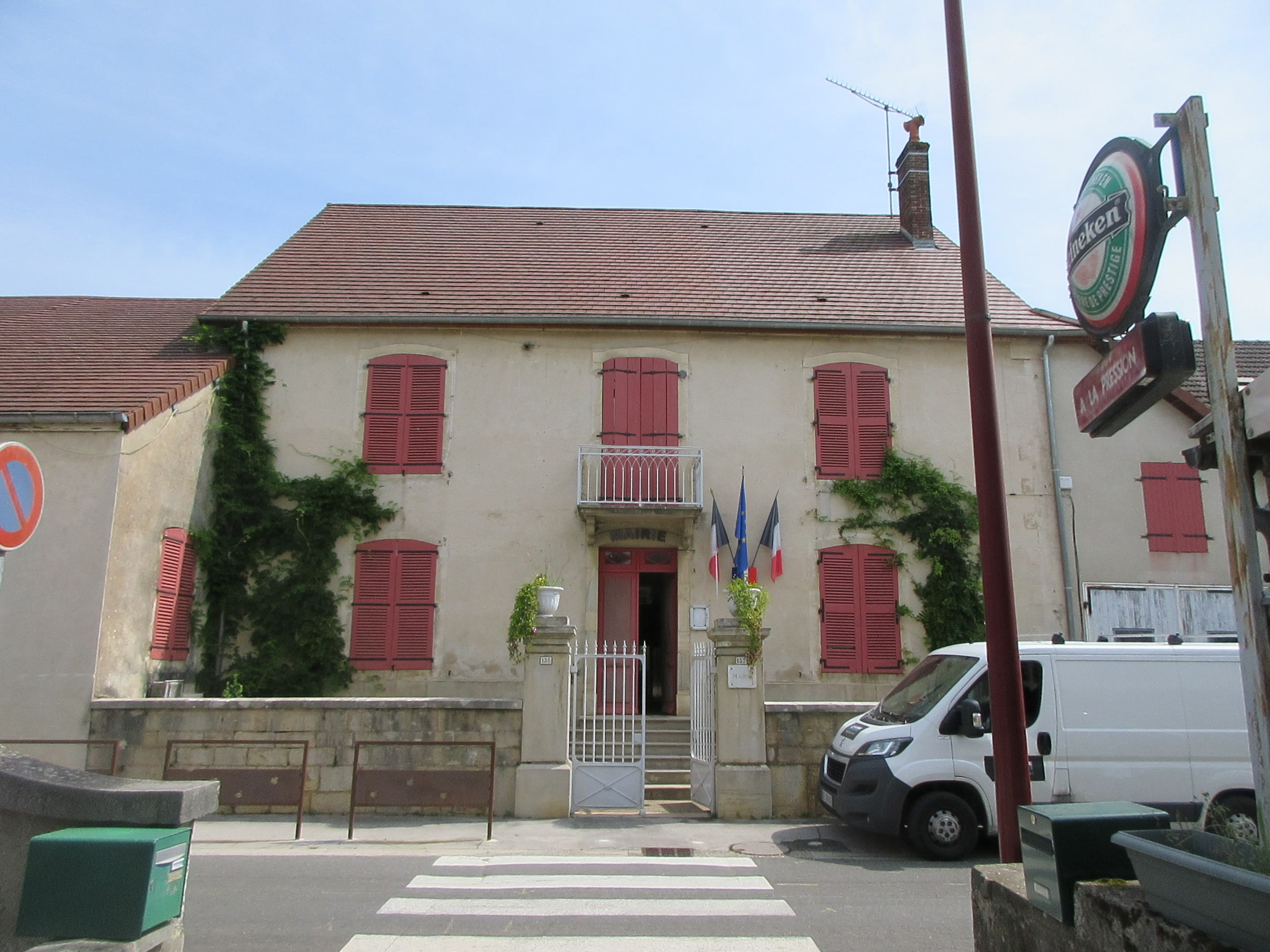 Mairie de Chilly-le-Vignoble.